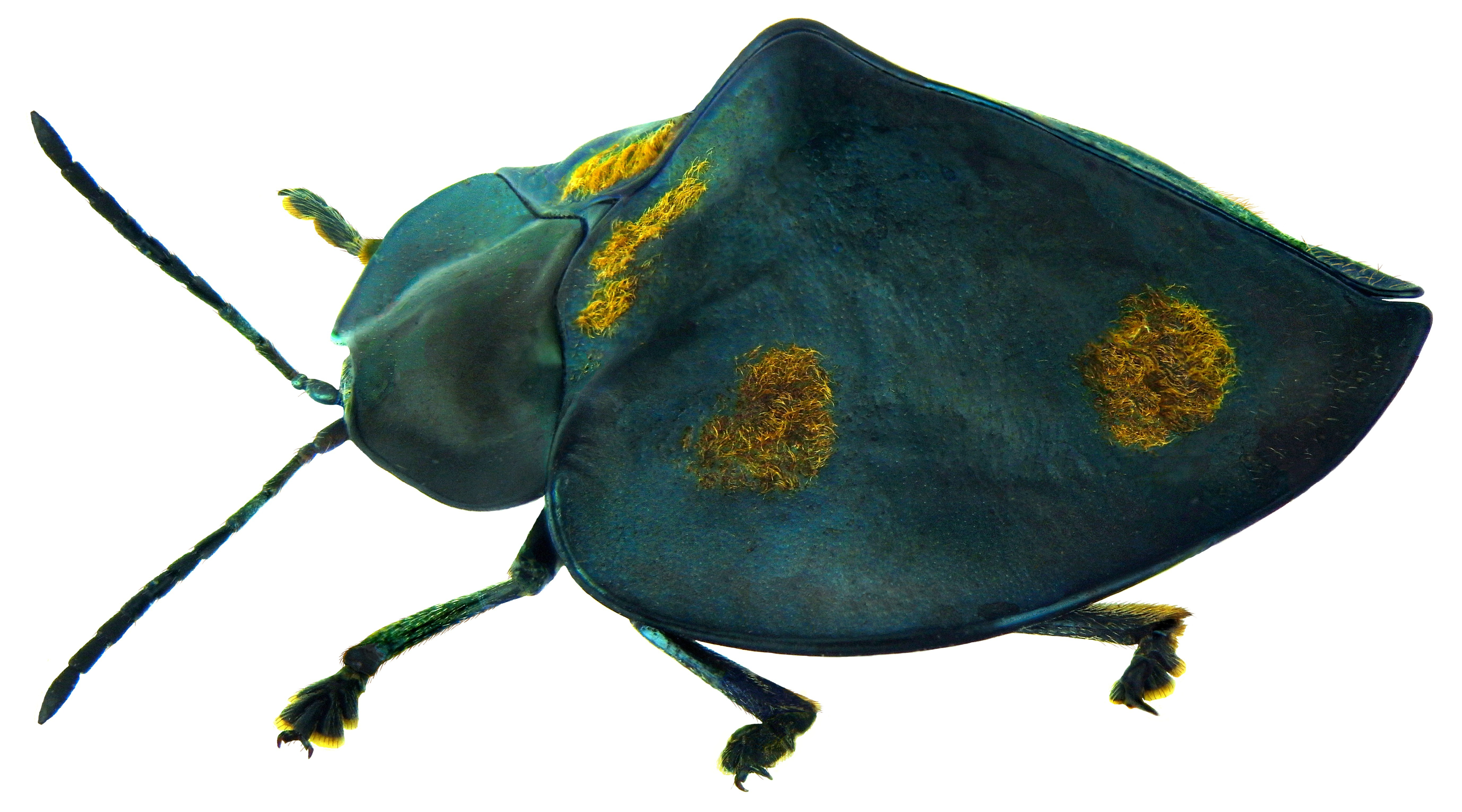 Familie: Chrysomelidae Groesse: 16,2 mm Fundort: Brasilien leg. 1973; det. L.Borowiec, 2011 Photo: U.Schmidt, 2011